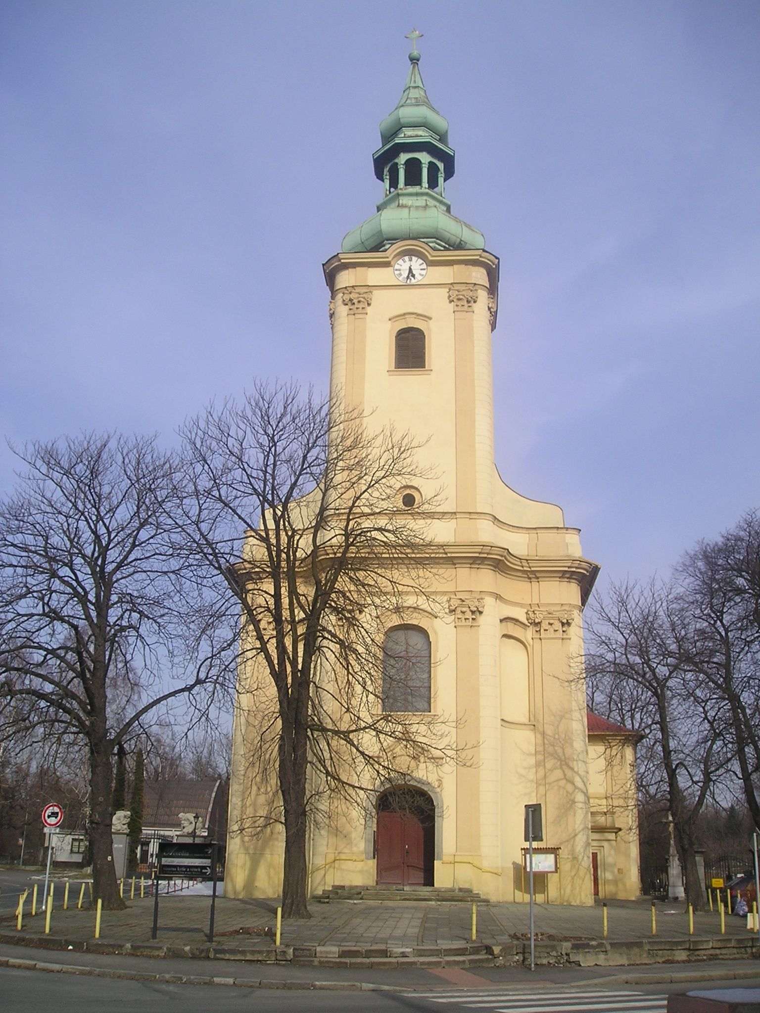 Kostel sv. Josefa v Ostravě - Slezské Ostravě